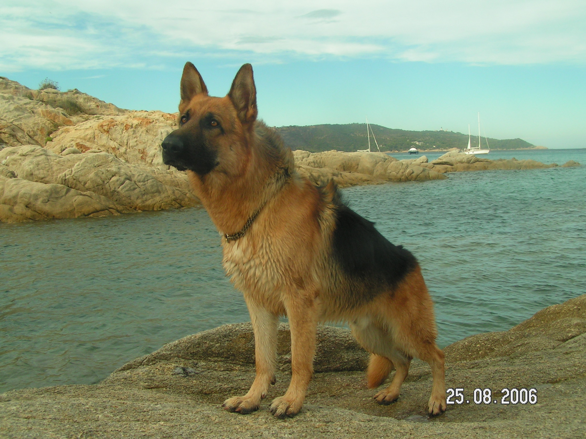 berger allemand à Saint-Tropez